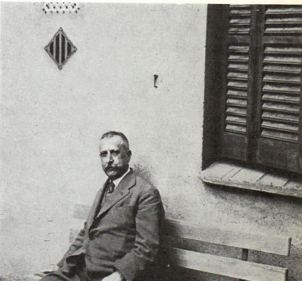 Joan Rubió i Bellver arquitecte